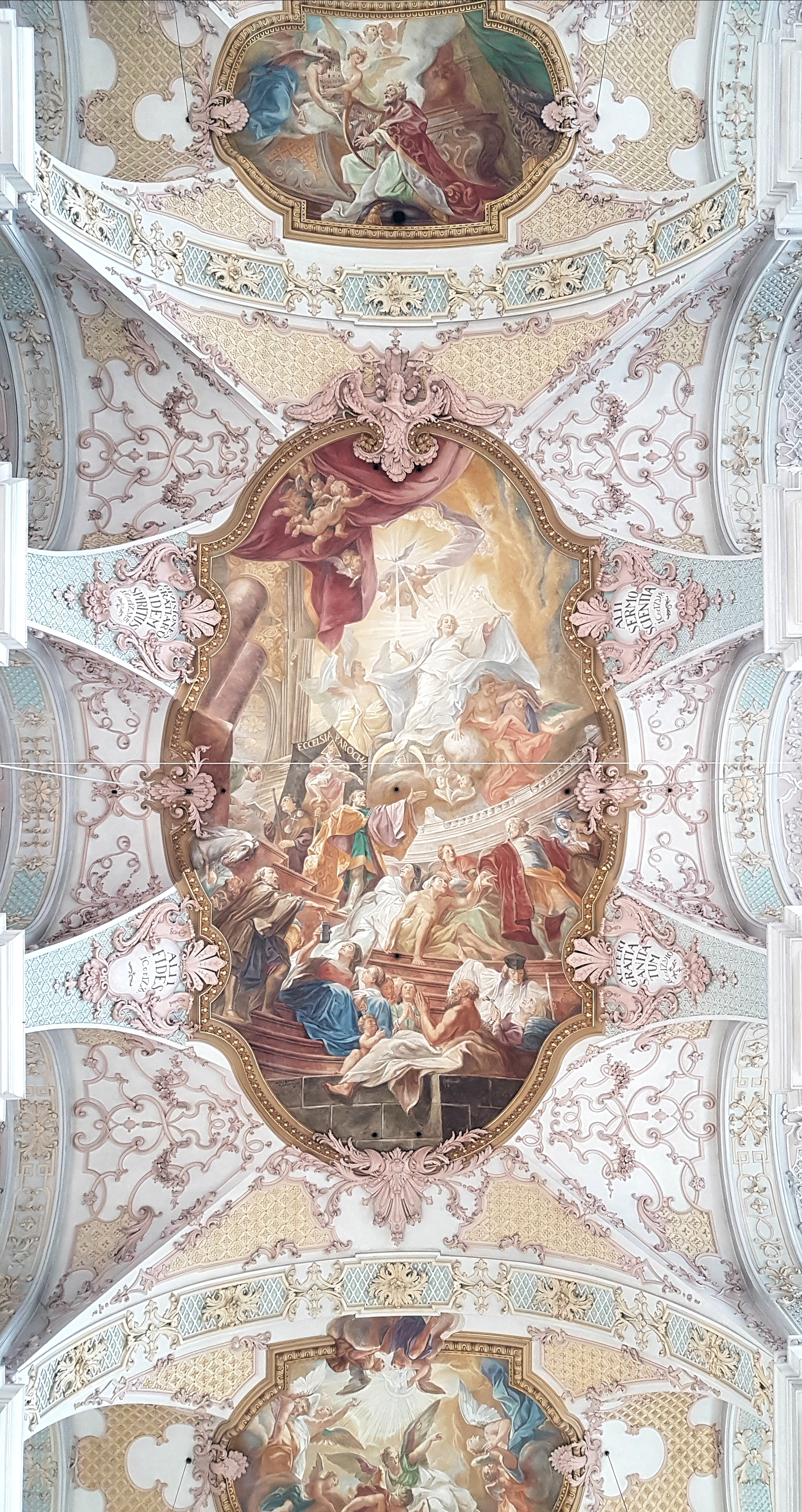 München, Hl. Geist, Mittelschiff-Fresken von Egid Quirin Asam.